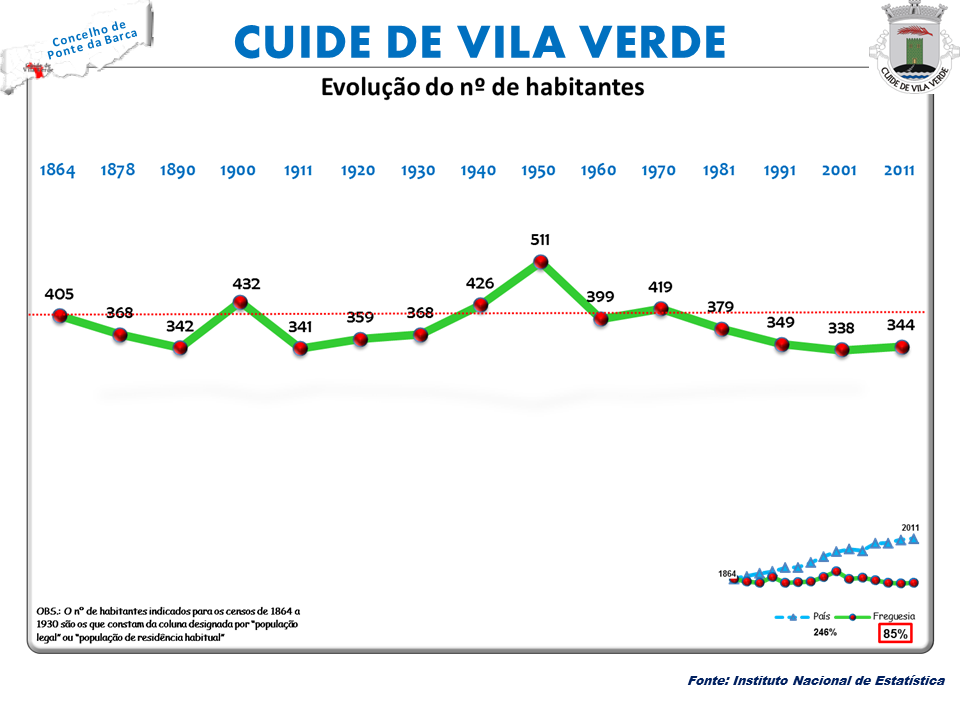 Censos 1864/2011